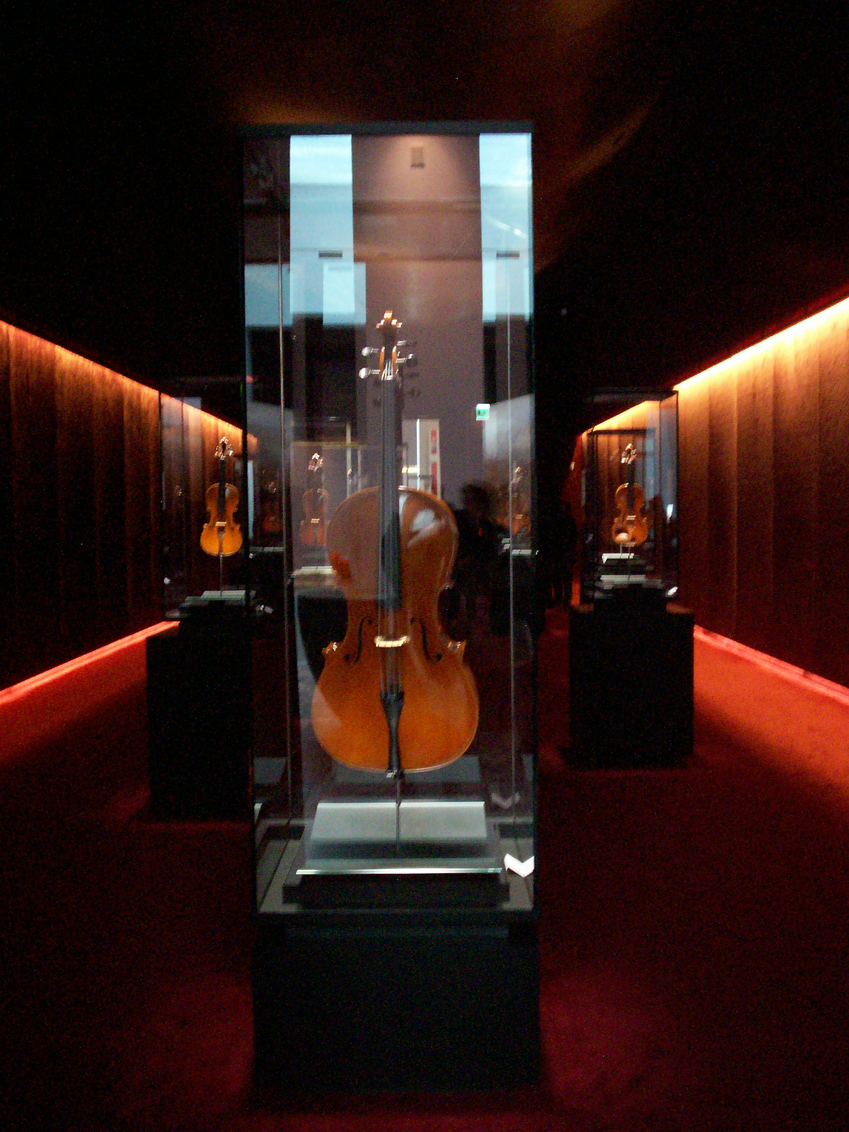 Palazzo dell'Arte - Museo del Violino This is a photo of a monument which is part of cultural heritage of Italy.